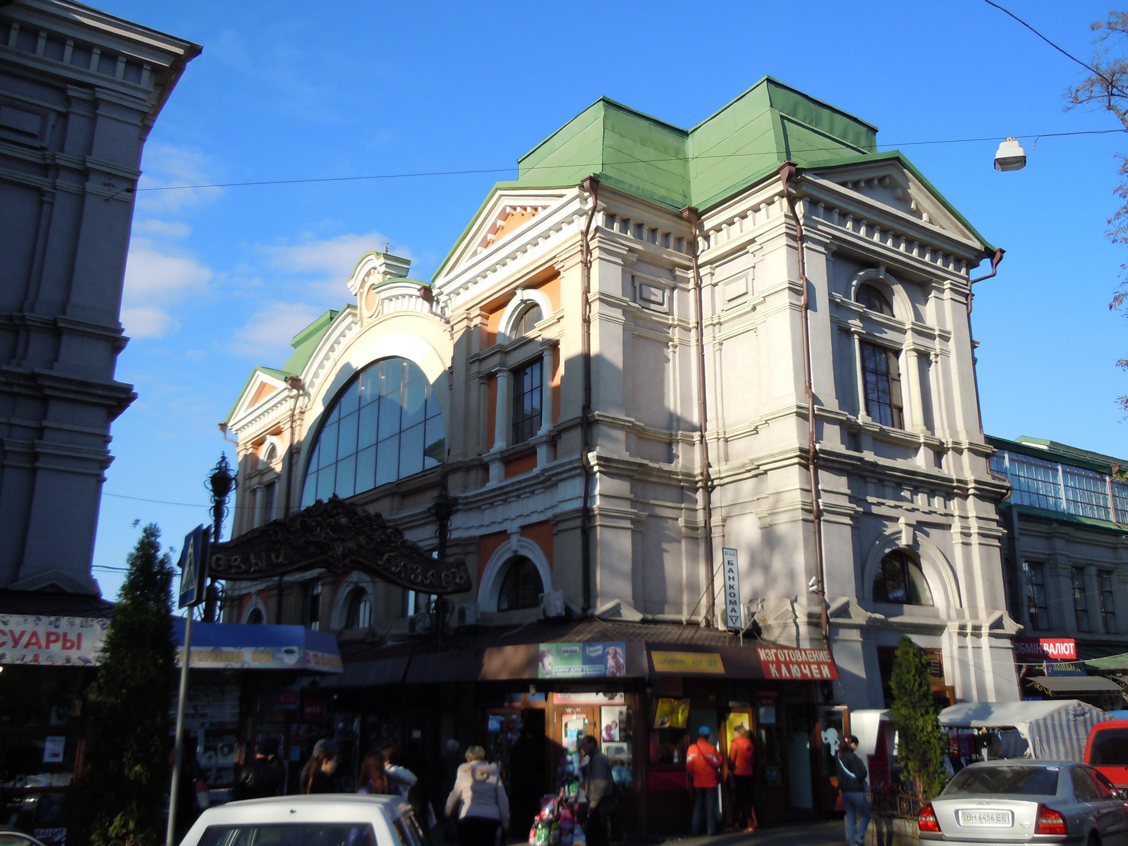 Головний вхід до Нового ринку в Одесі, Україна